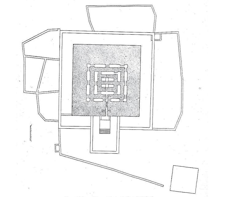 Algérie, près de Frenda. Plan du Djeddar C levé par Oscar Mac Carthy.